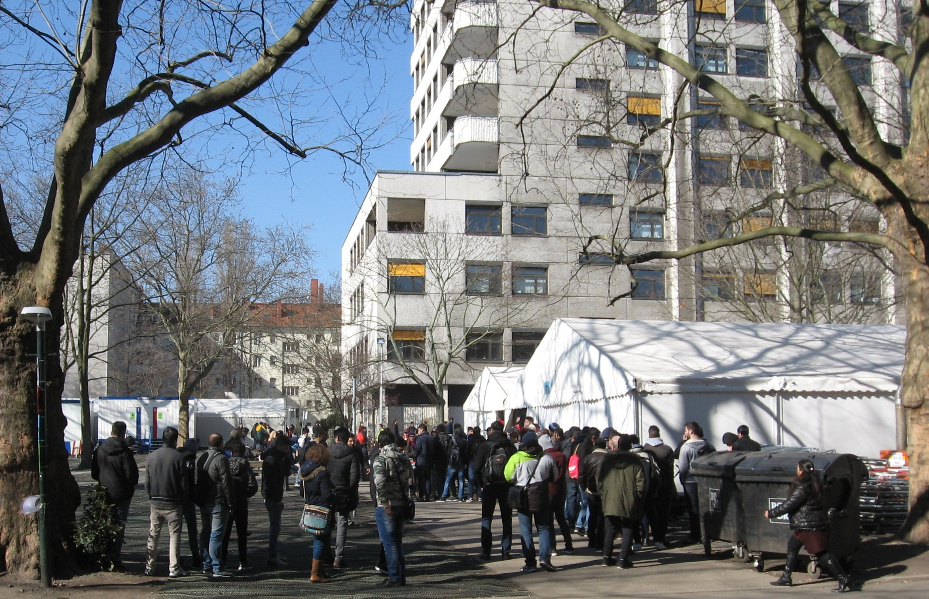 Teil des Gebäudes vom Landesamt für Gesundheit und Soziales (LAGeSo) in Berlin-Moabit, Turmstraße 21 mit Zelten östlich des Gebäudes und wartenden Flüchtlingen.